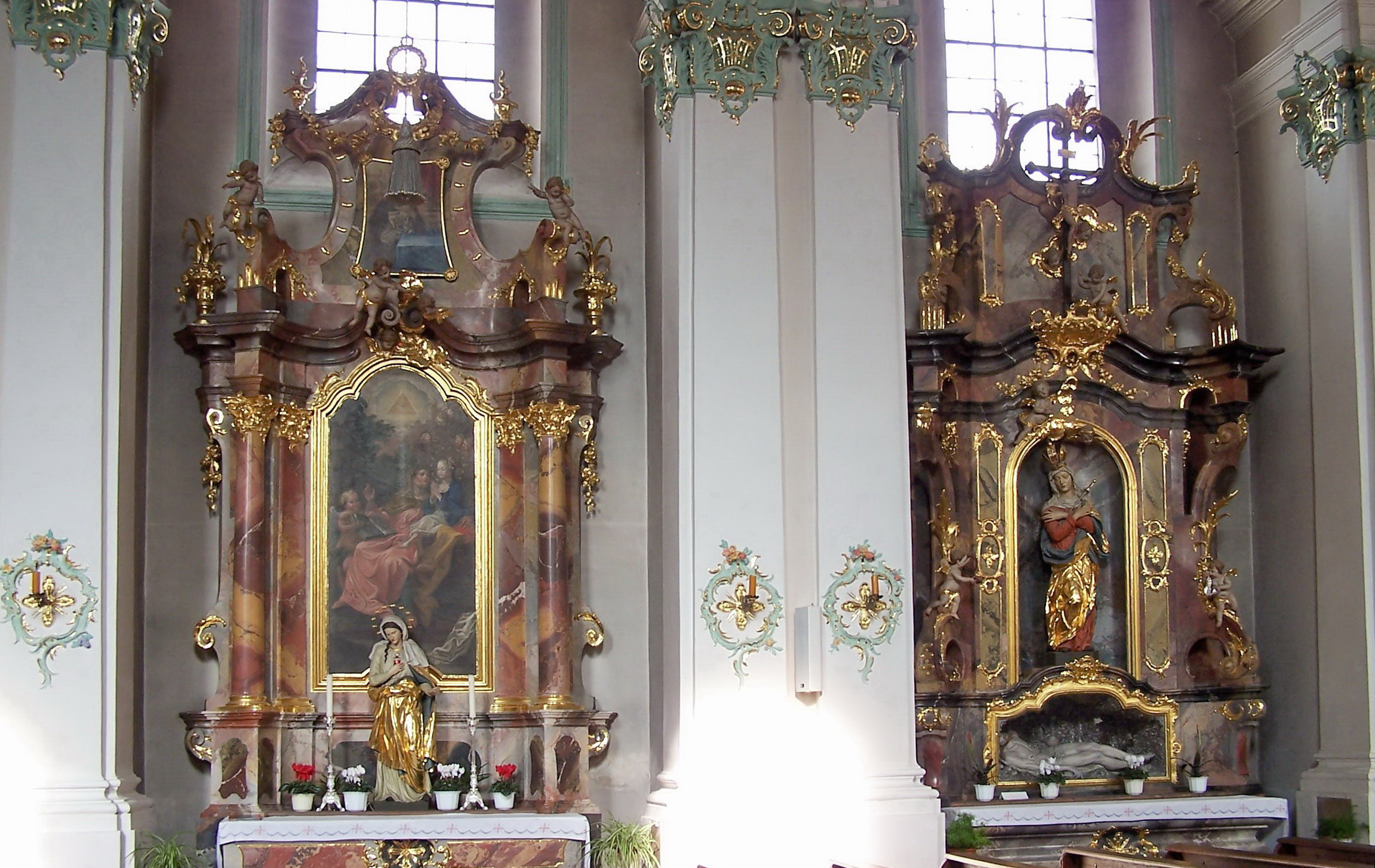 Geiselhöring, Schlossgraben 17. Katholische Stadtpfarrkirche St. Petrus und Erasmus. Barockes Langhaus, 1761-64 von Georg Fischer. Seitenaltäre an der Nordseite des Kirchenschiffs.